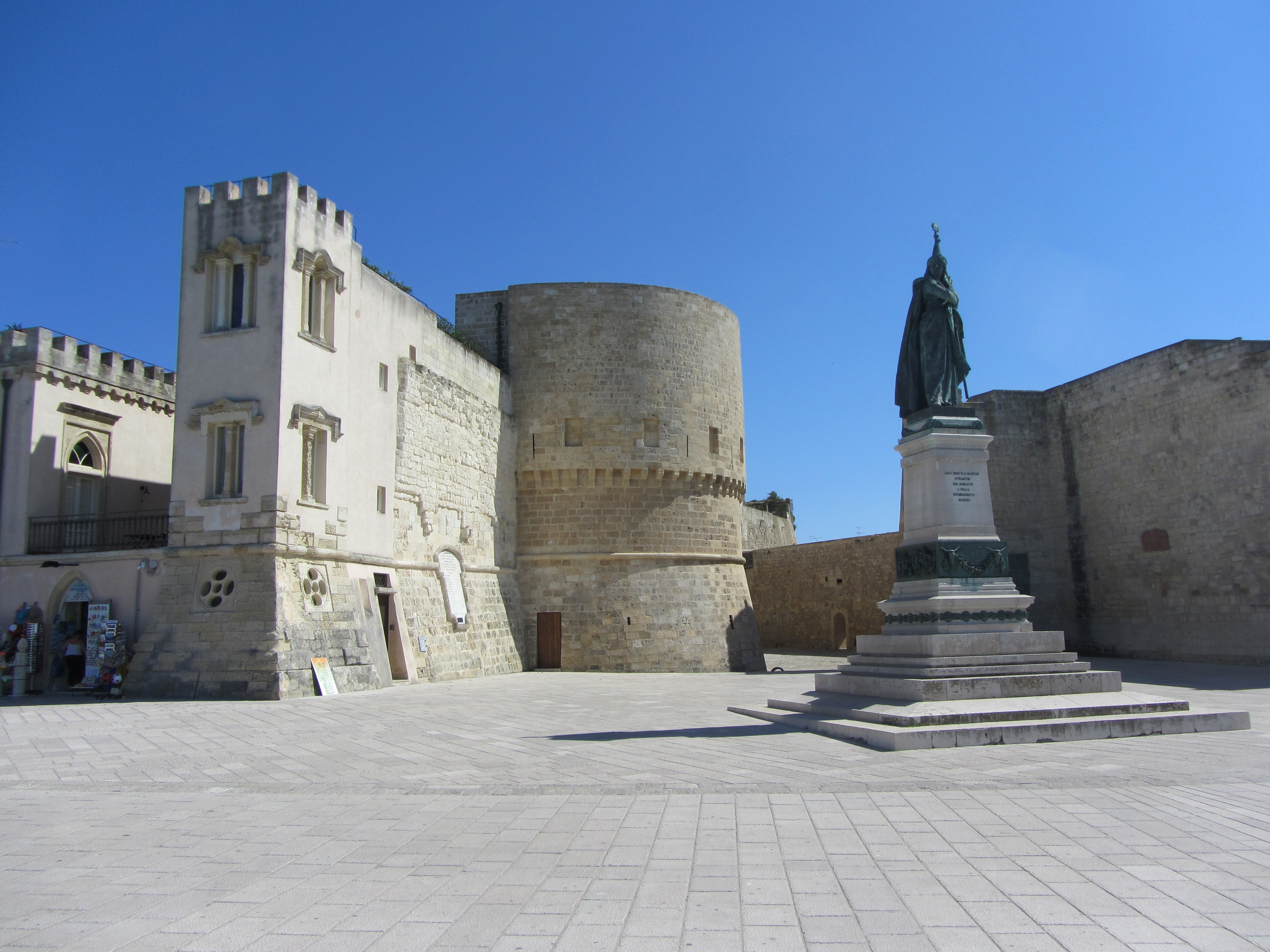 Centro storico di Otranto (Lecce, ITALIA)